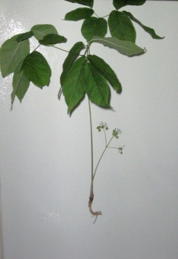 Aralie à tige nue. Spécimen d'une grande colonie en sous-bois d'une pinède au Québec